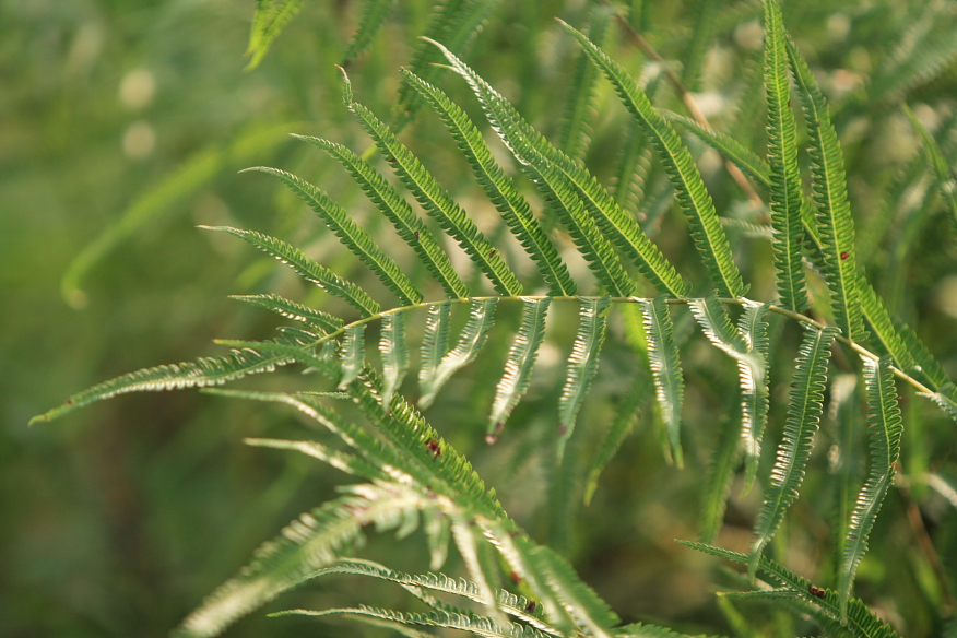 Cyclosorus acuminatus 渐尖毛蕨